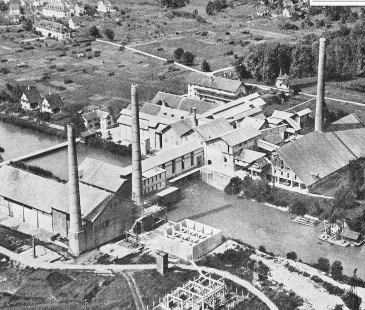 Die Fabrikationsanlagen der JGF in Aarau nach Vollendung der 3. Erweiterung des Kraftwerkes «Rüchlig» und kurz vor der Stillegung der Zementfabrik im Jahre 1929.